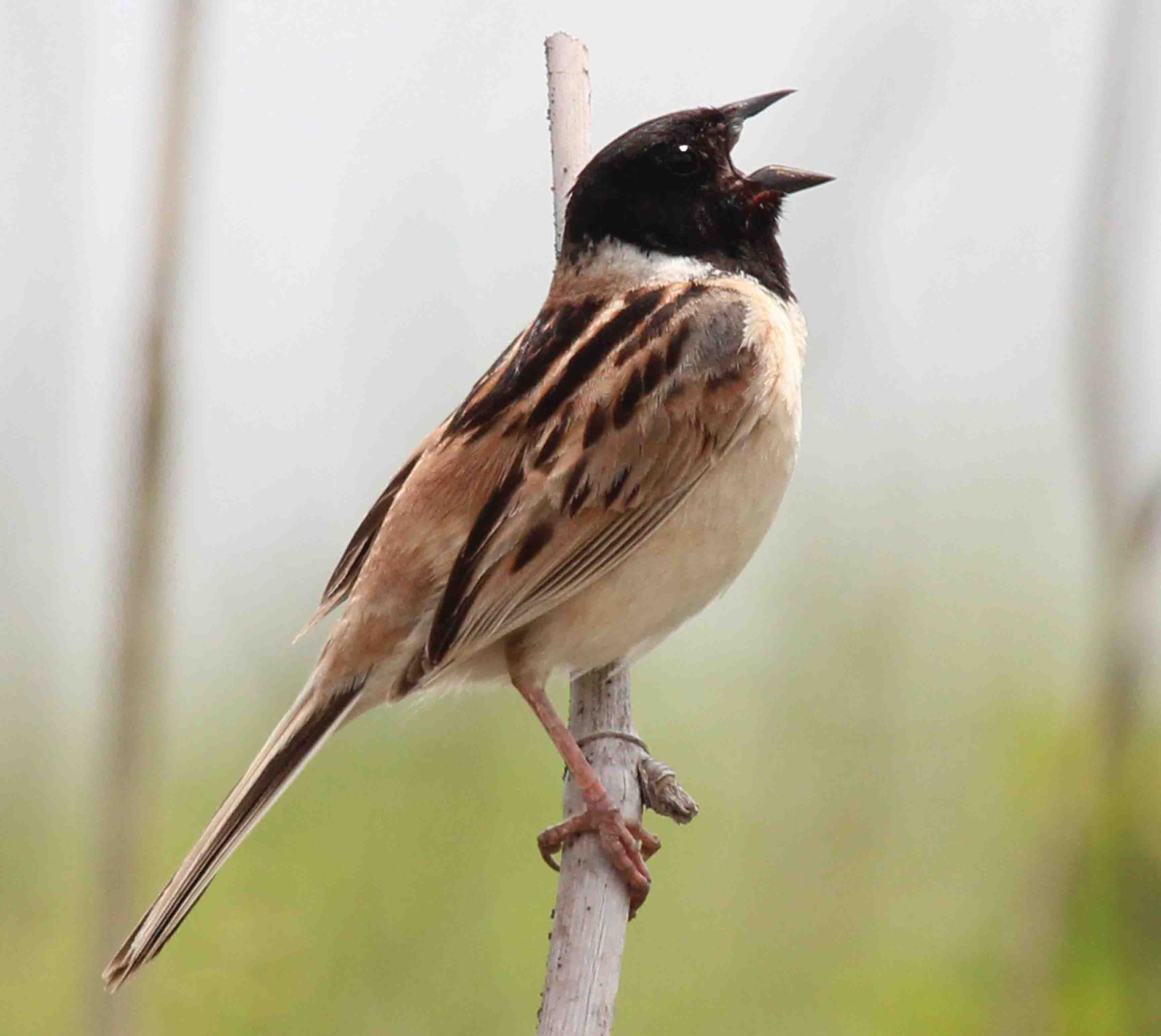 コジュリンのオス